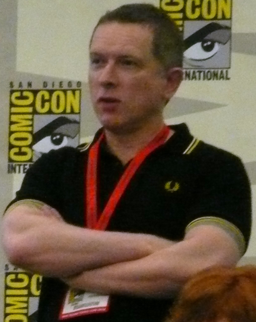 James Robinson na San Diego Comic-Con 2010